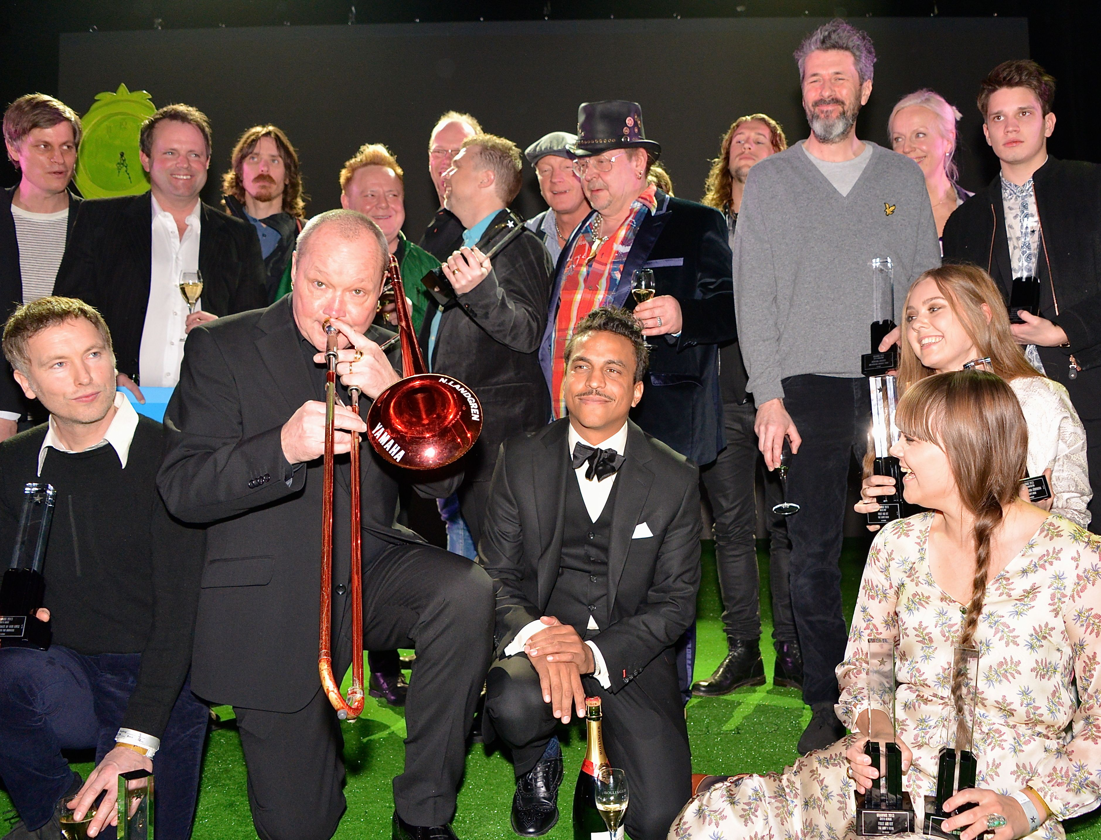 Några Grammisvinnare på Grammisgalan på Cirkus, Stockholm den 20 februari 2013.